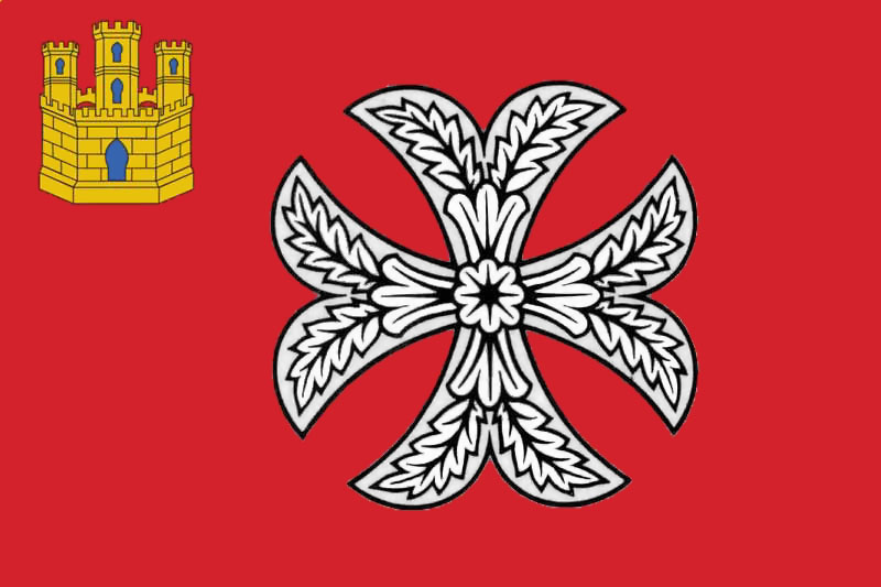 Bandera de San Millán de la Cogolla, en La Rioja (España)